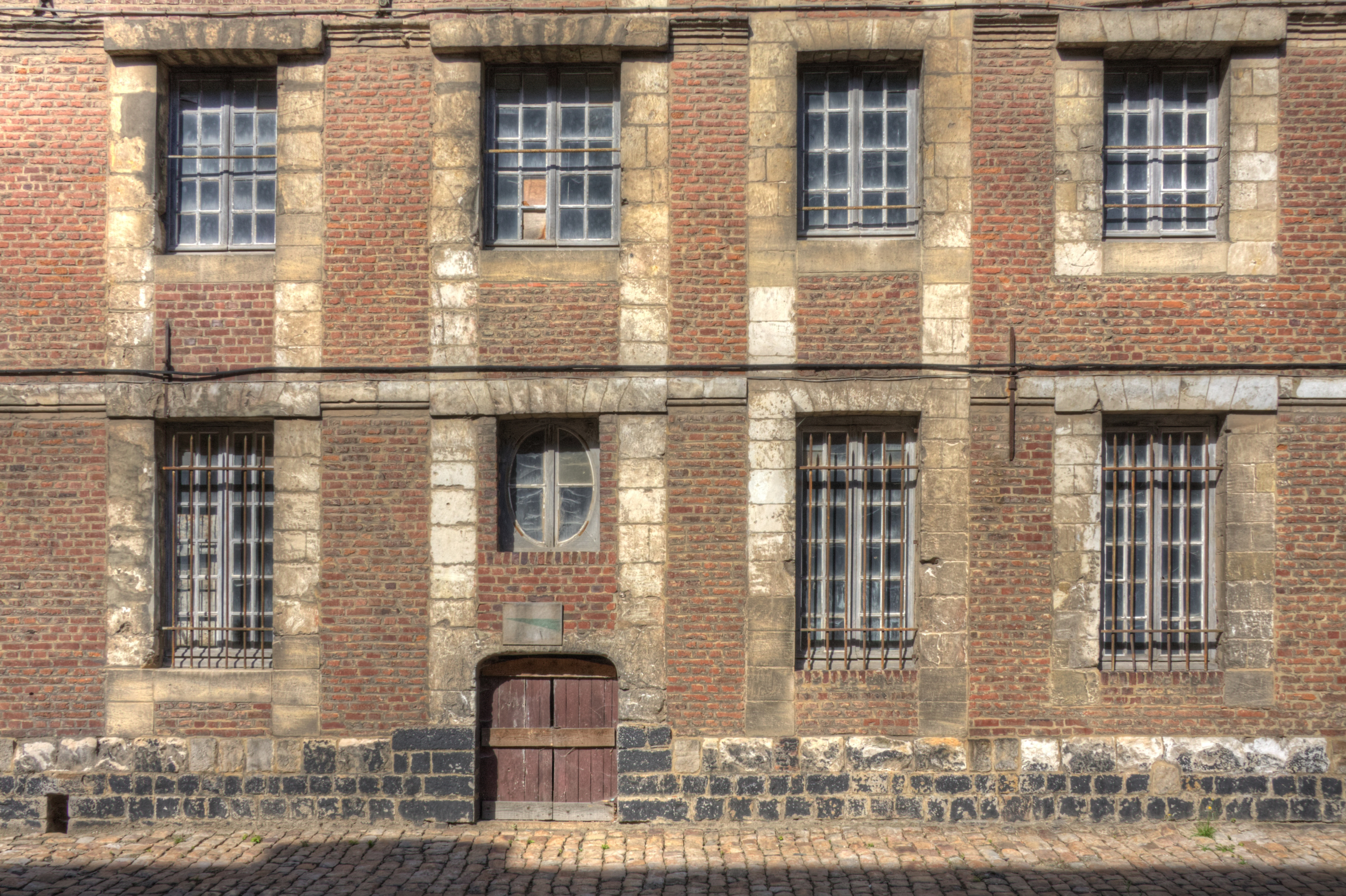 Façades des bâtiments de la citadelle d'Arras